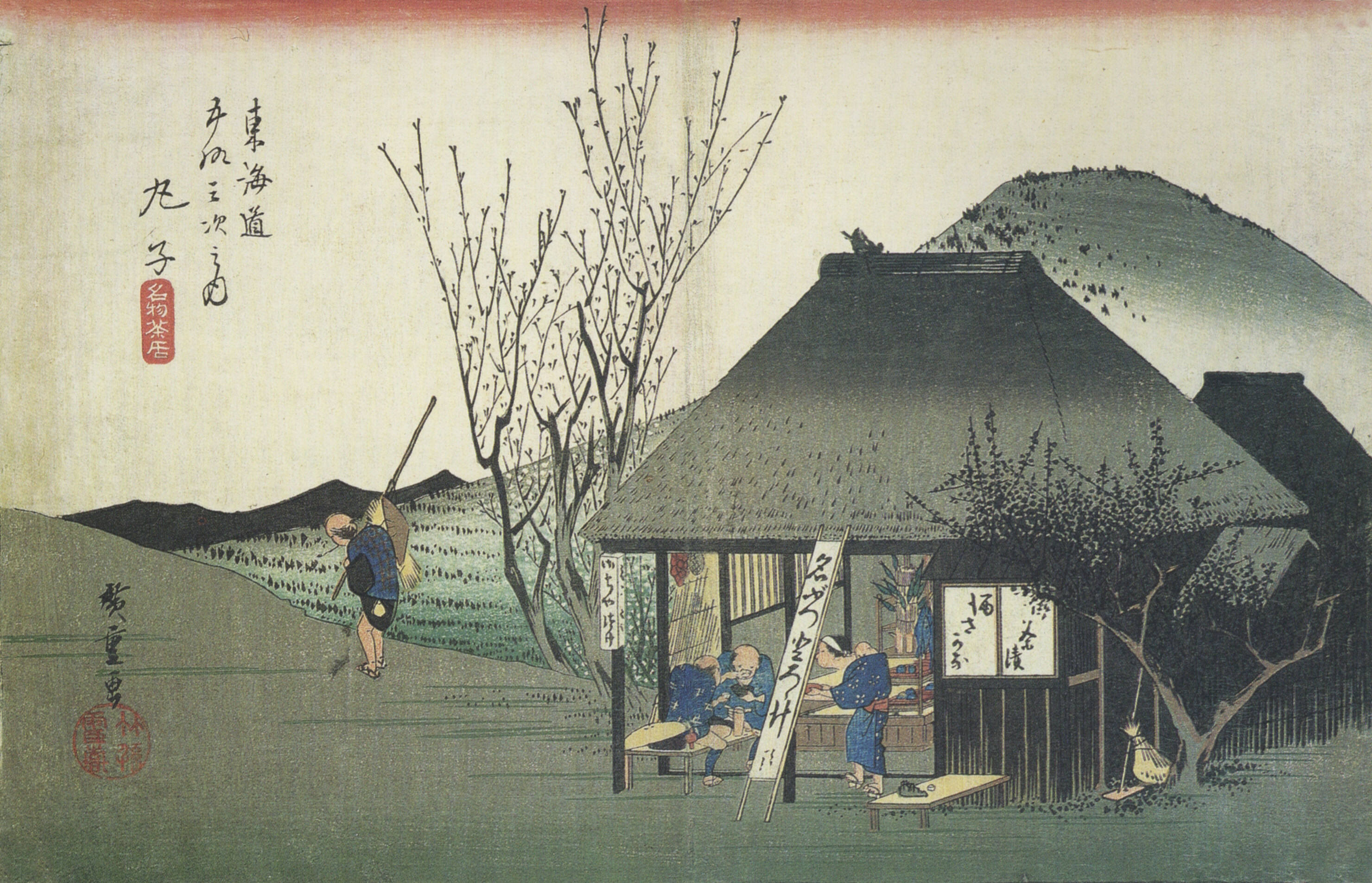 "Tokaido-53tugi Mariko",ukiyo-e by Hirosige.